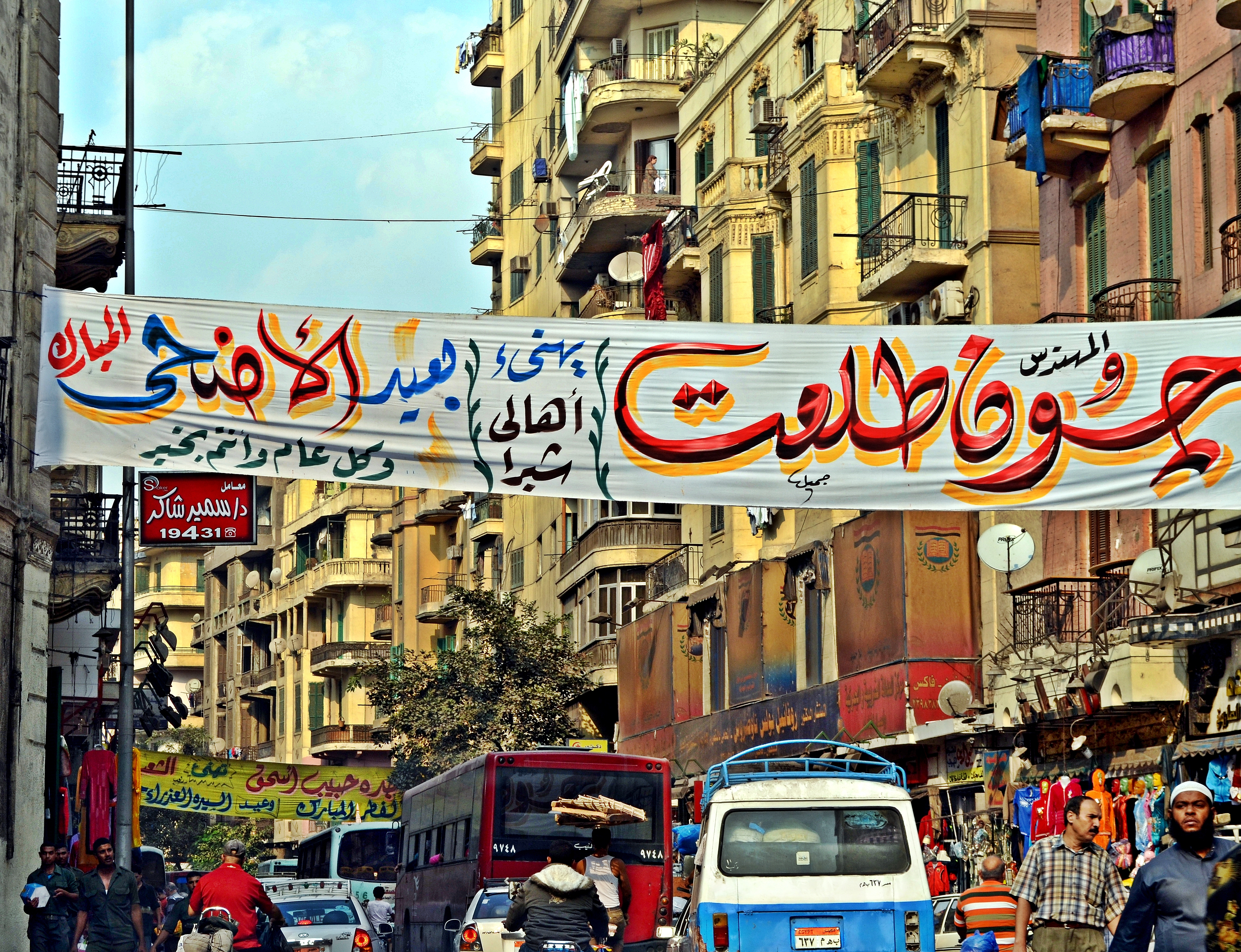 تهنئة بالعيد، شبرا